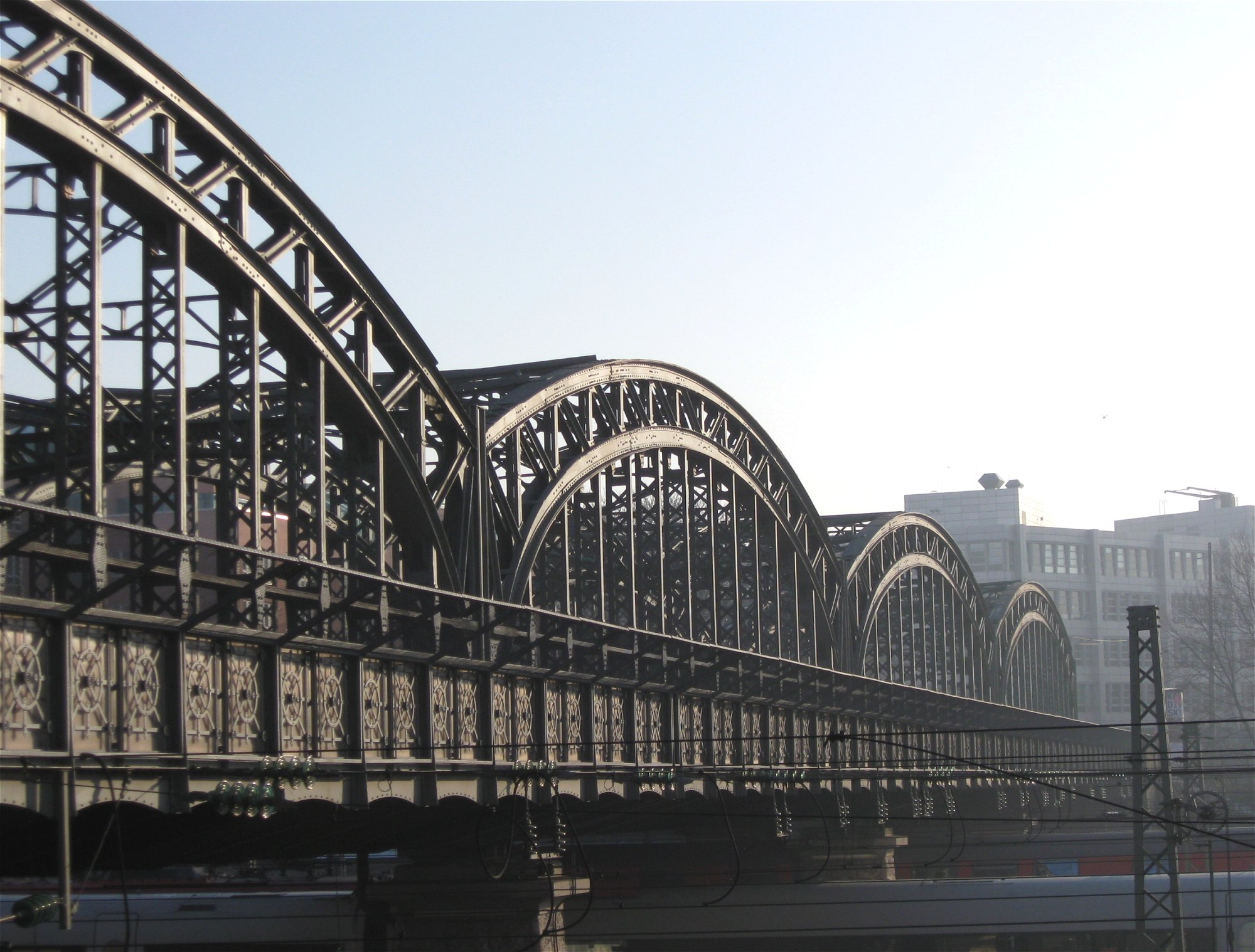 Hackerbrücke in München, Blick nach Osten